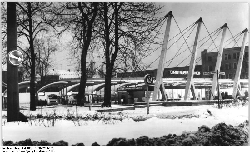 Chemnitz, Bus-Bahnhof, Winter, Abend Zentralbild Thieme 8.1.68 Karl-Marx-Stadt: Omnibus-Bahnhof eröffnet Der modernste Omnibusbahnhof der DDR wurde am 7.1.68 nach zweijähriger Bauzeit in Karl-Marx-Stadt übergeben.Der Bahnhof verfügt über zwölf Abfahrtsbansteige, einen sechzig Meter langen Ankunftsbahnsteig sowie eine freitragende Wartehalle, in der Kassenschalter, Telefonzellen, Gepäckautomaten und Verkaufsstände untergebracht sind. Täglich passieren 30.000 Fahrgäste den Omnibus-Bahnhof, der mit rund sieben Millionen Mark Investitionsmitteln als Experimentalbau der Deutschen Bauakademie errichtet worden ist.